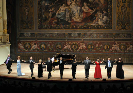 Sempersoiree